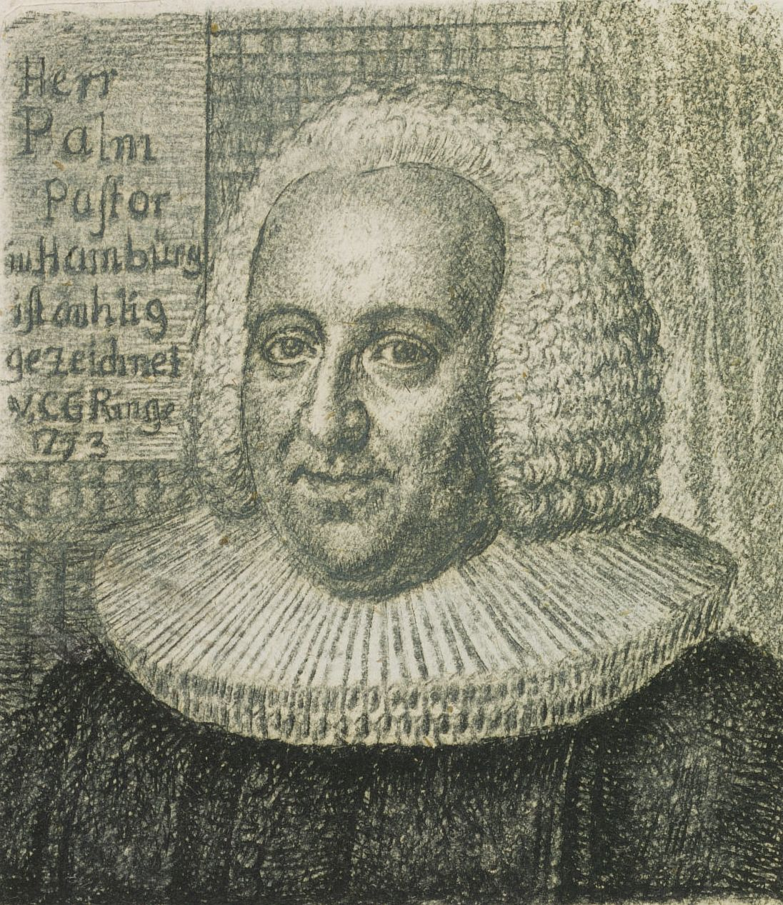 Bildnis von Johann Georg Palm